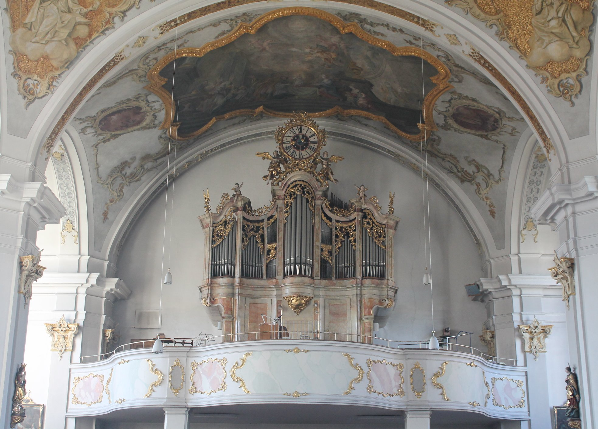 Orgel von St. Nikolaus in Mühldorf am Inn (1973, Max Sax, III/37)